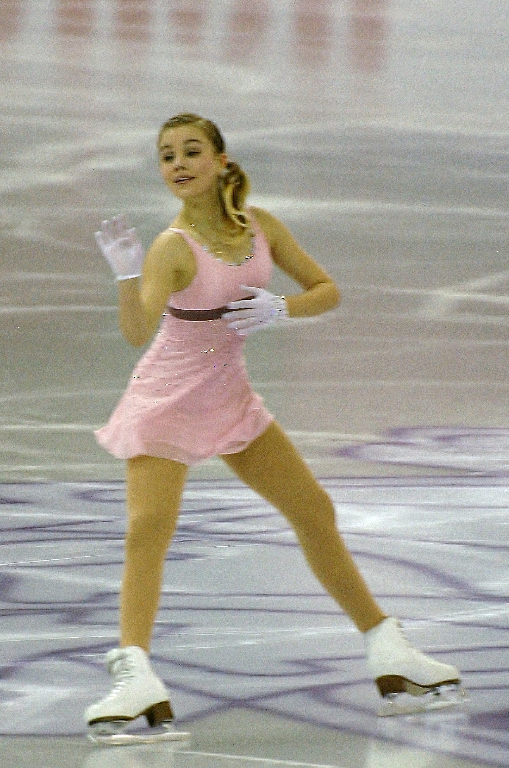 Алиса Федичкина (Россия) на финале Гран-при по фигурному катанию среди юниоров 2015-2016.